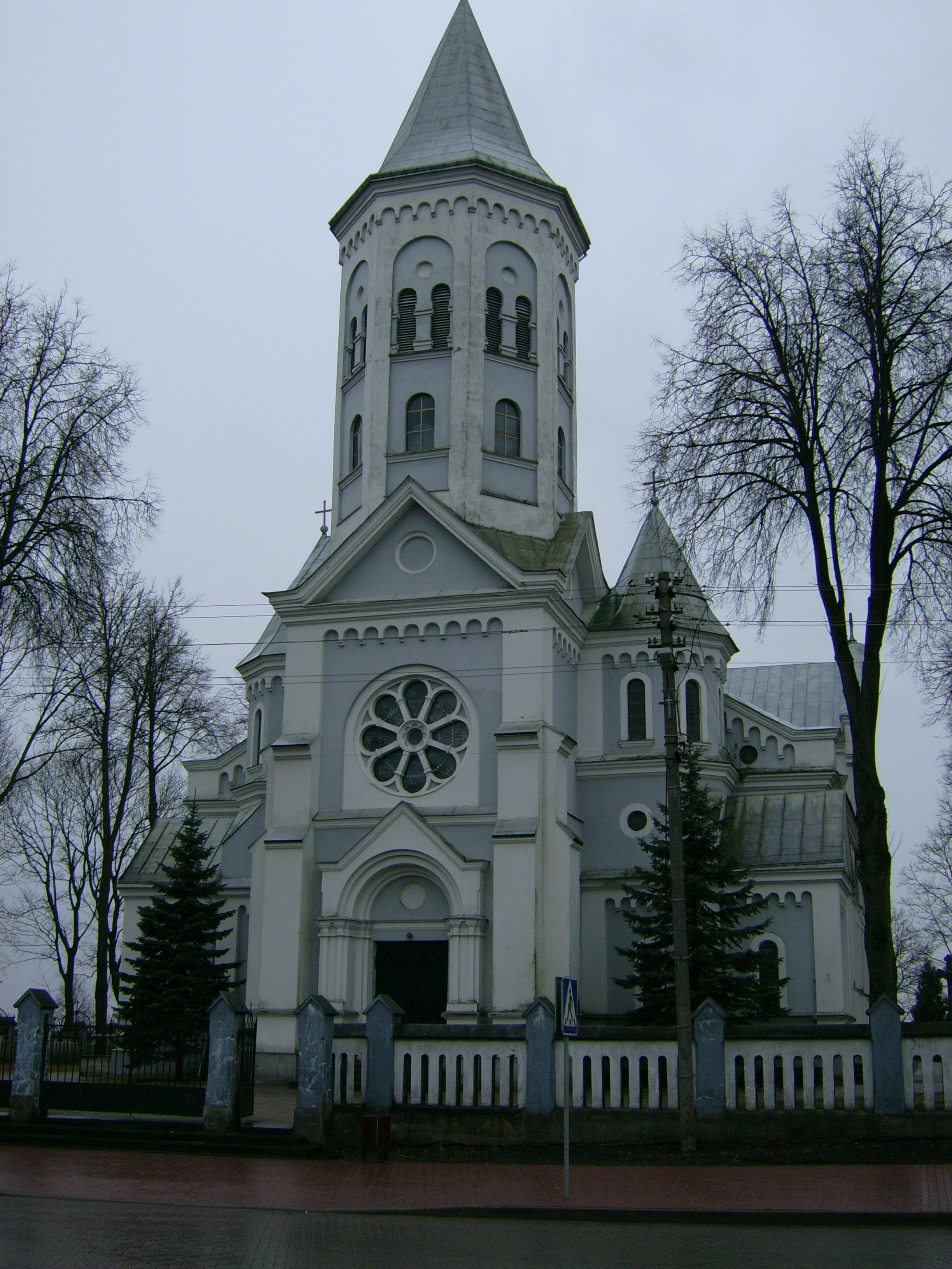 Tauragės katalikų bažnyčia